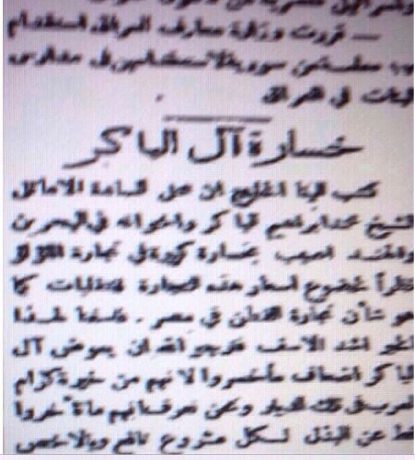 مقالة من جريدة فلسطينية عن خسارة ال الباكر في البحرين و قطر